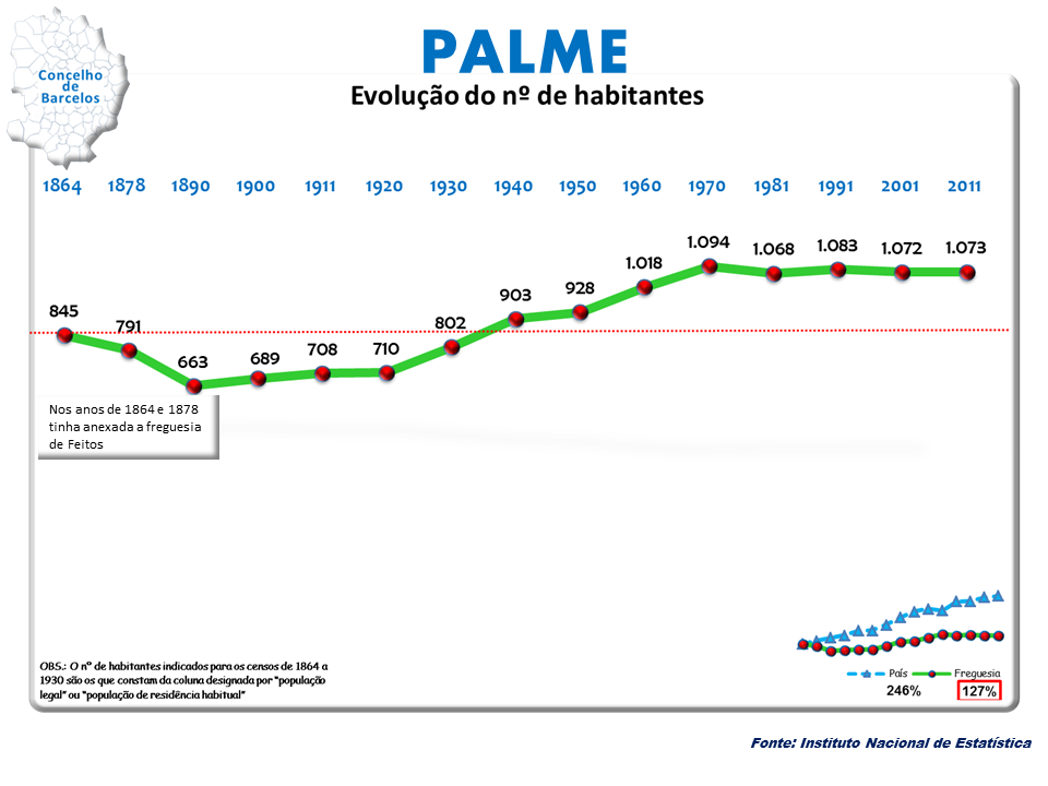 Censo 1864/2011